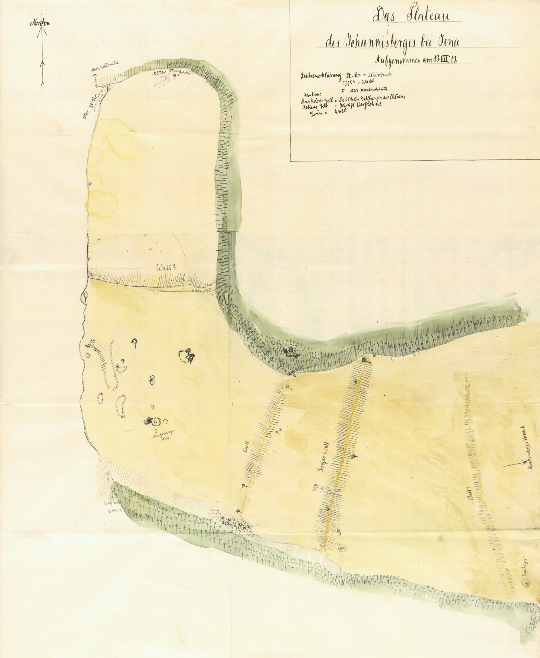 Jena-Lobeda, Johannisberg. Skizze der Wallanlagen und Ausgrabungsstellen von Walther Cartellieri 1912.